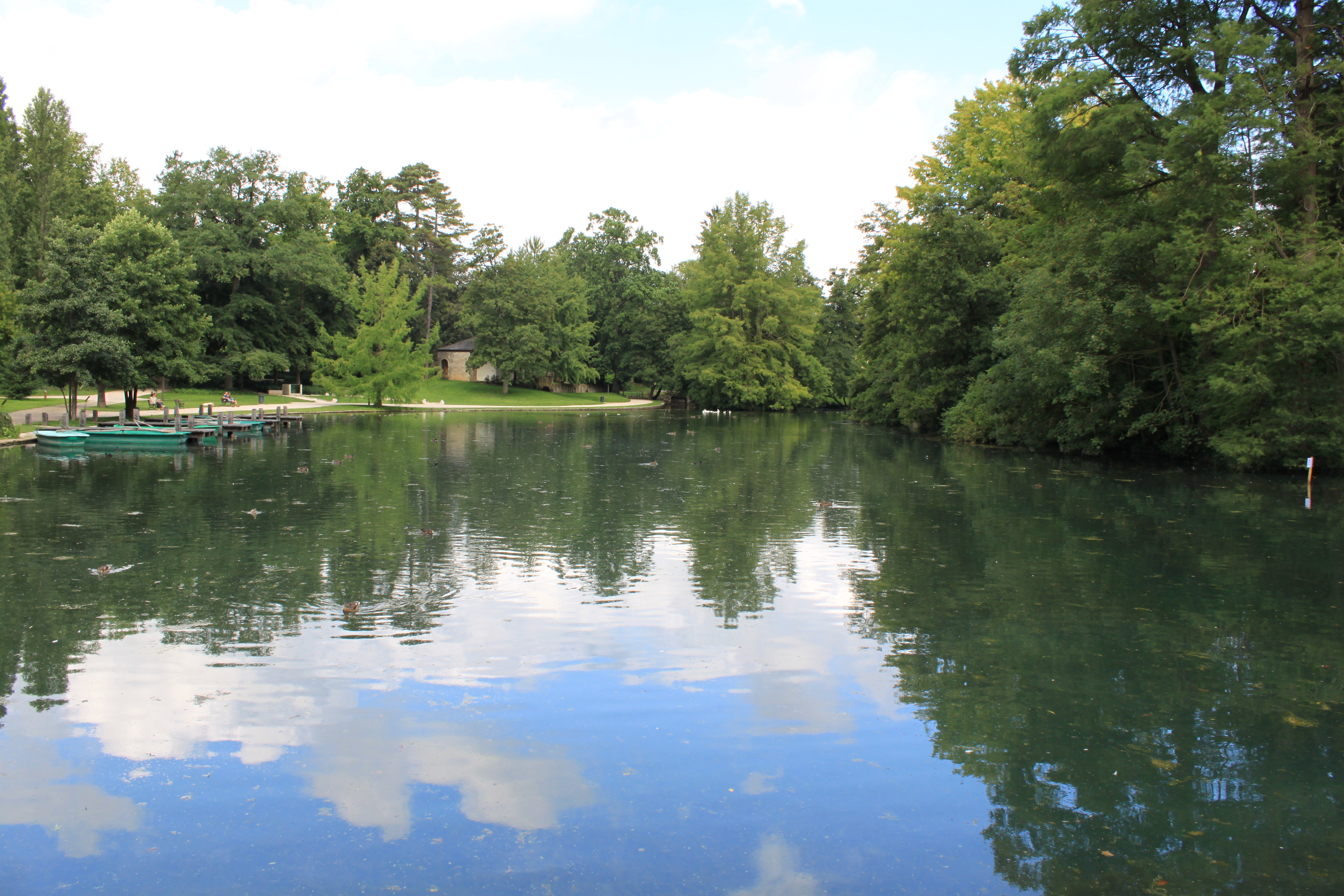 Parc de la Bouzaize, Beaune, Côte-d'Or, Bourgogne, France